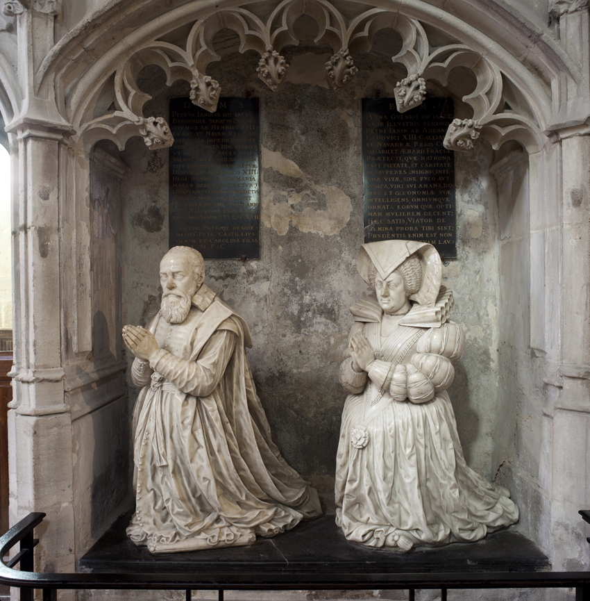 Autun (Saône-et-Loire, France), cathédrale Saint Lazare, statues funéraires de Pierre Jeannin et sa femme.